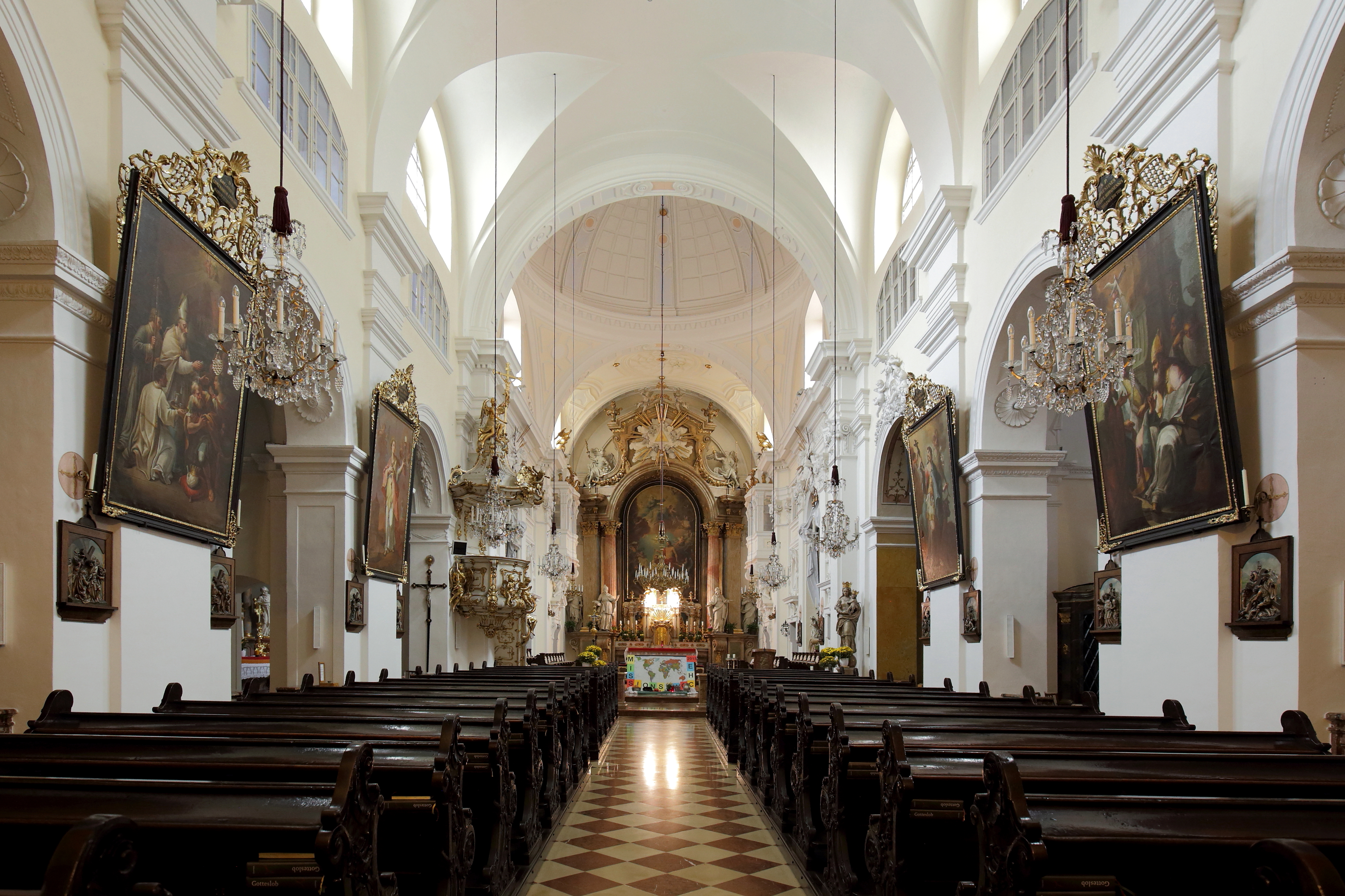 Innenansicht in Richtung Altar der Klosterkirche der Barmherzigen Brüder im 2. Wiener Gemeindebezirk Leopoldstadt. Die Kirche in ihrer gegenwärtigen Form wurde von 1683 bis 1692 erbaut. 1733/1734 wurde der Chor erweitert und der Turm durch Franz Anton Pilgram neu errichtet. Die Stuckarbeiten stammen von Santino Bussi. Der Hochaltar ist ein Werk aus den Jahren 1735/1736, wobei das Ölgemälde mit dem Thema "Taufe Christi" von Daniel Gran gemalt wurde und die vier seitlichen Marmorstatuen (heiliger Joachim, heiliger Zacharias, heilige Elisabeth, heilige Anna) von Lorenzo Mattielli stammen.